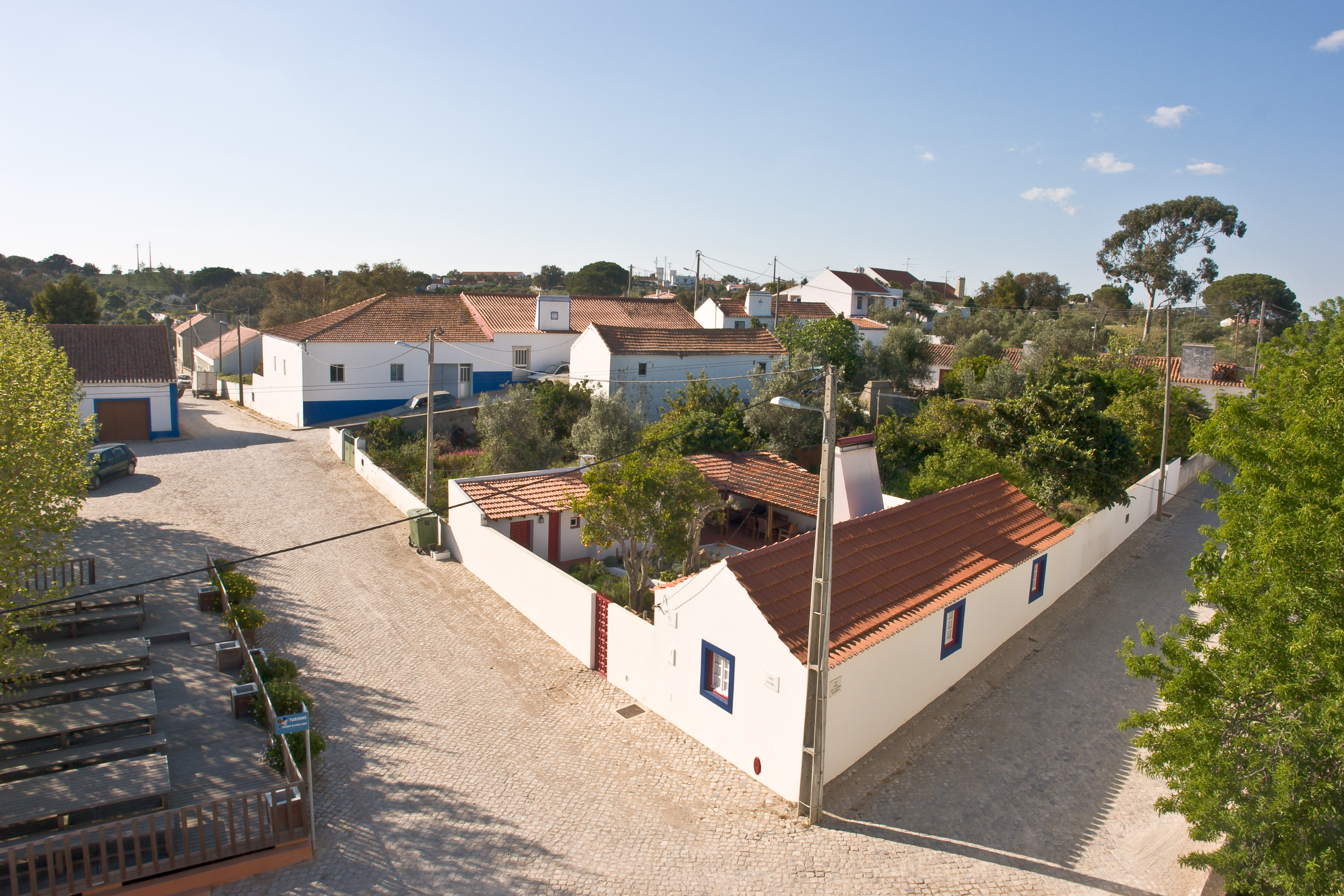 Blick vom Aussichtsturm über das Dorf